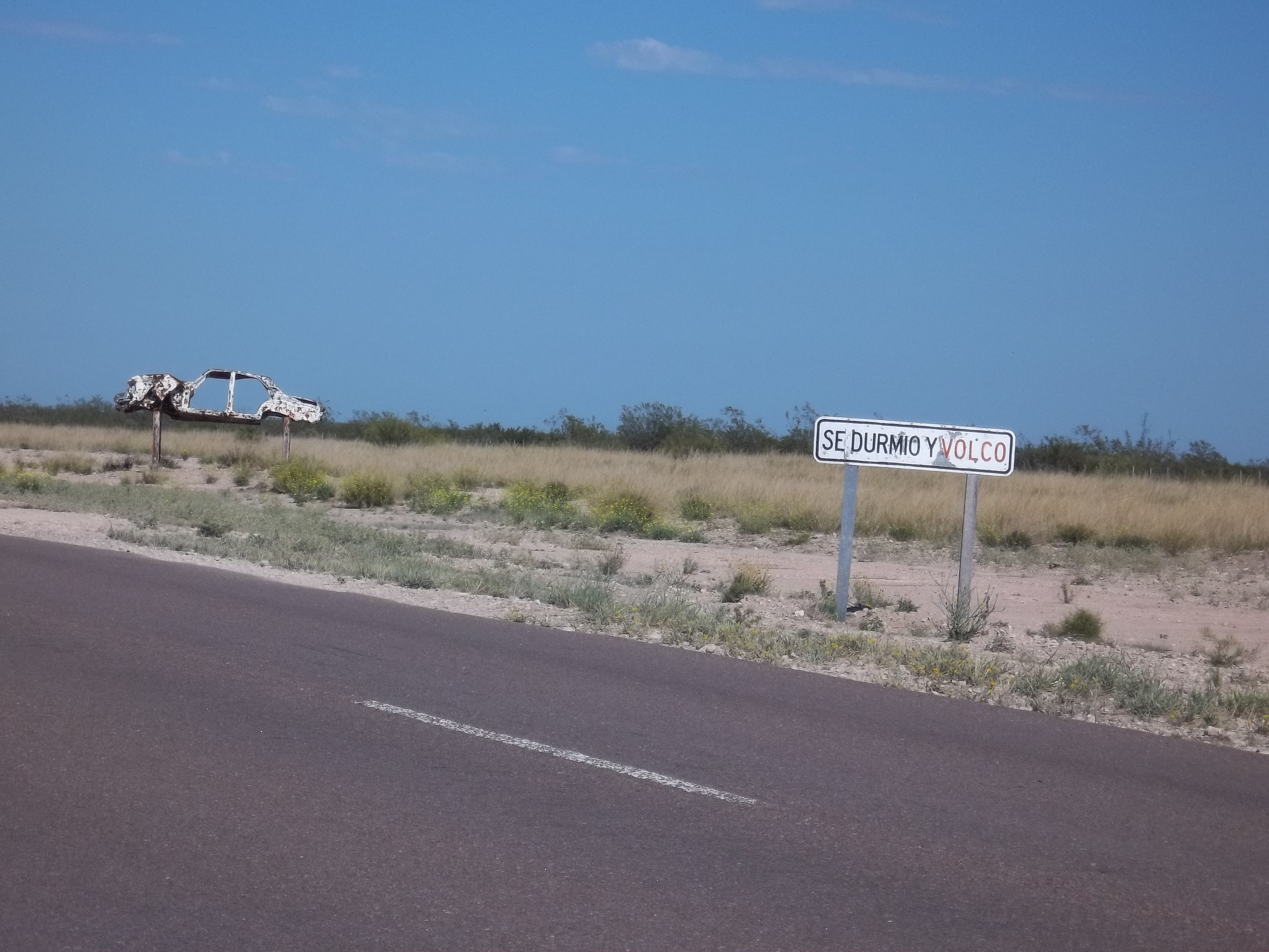 Ruta Provincial 20 denominada Conquista del Desierto en la provincia de La Pampa, Argentina.